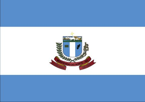 Bandeira de Montividiu do Norte, Goiás, Brasil.